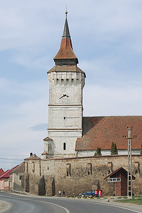 Ev. Kirche in Rothbach (Rotbav), Siebenbürgen